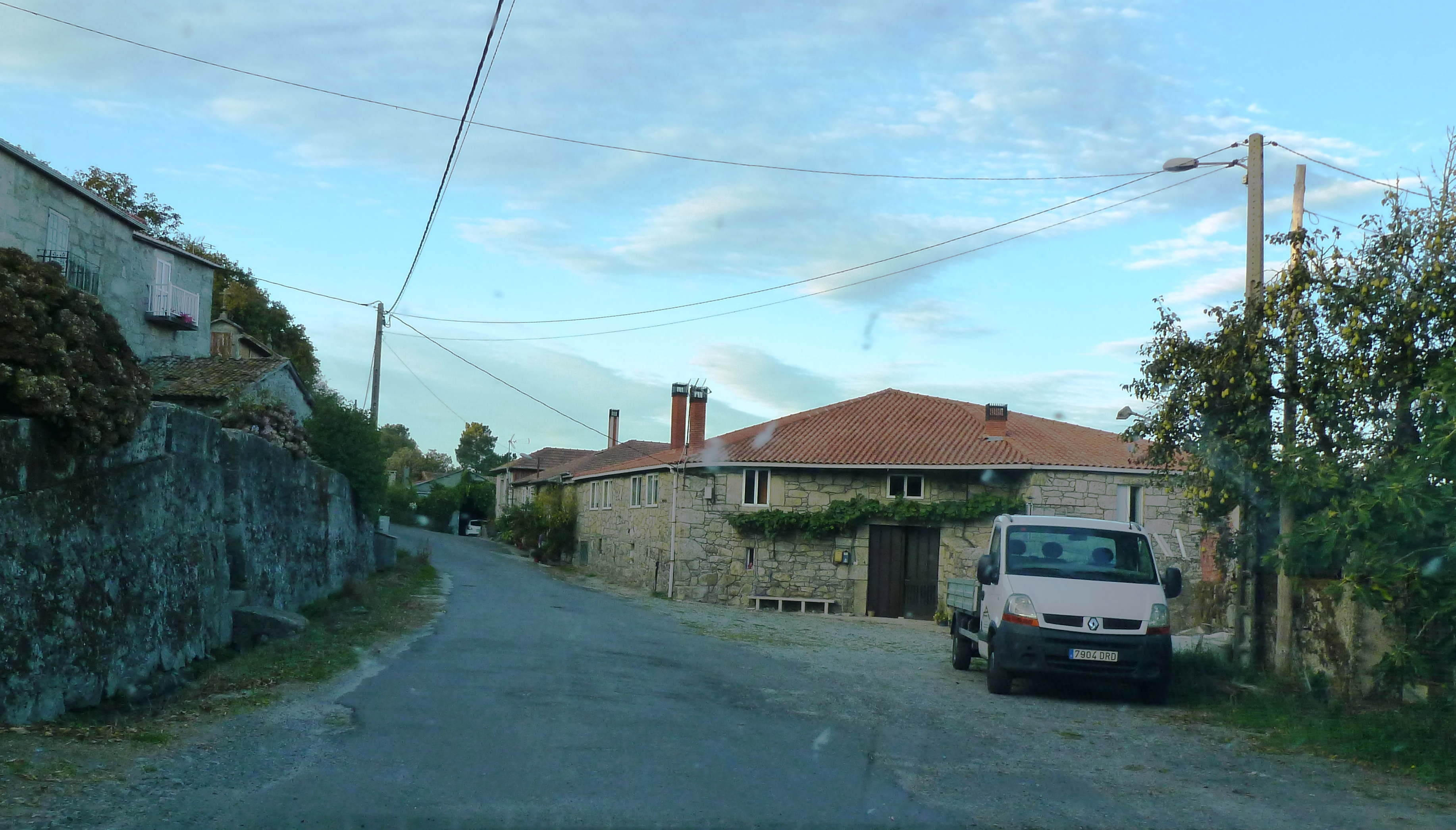 Trasar de Sabugueiro, Buciños, Carballedo